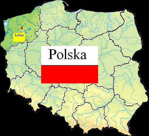 Łobez-Polska